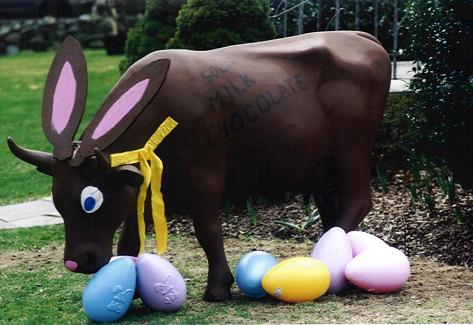 Gladys as a chocolate easter bunny